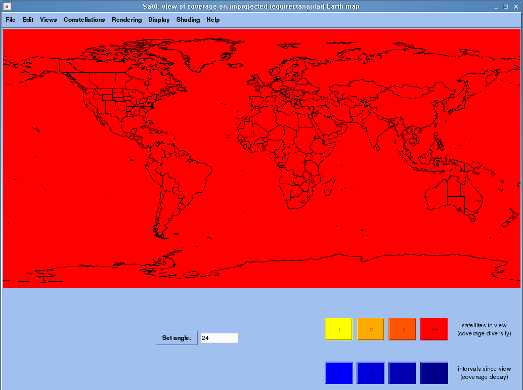 Coverage MEOSAR